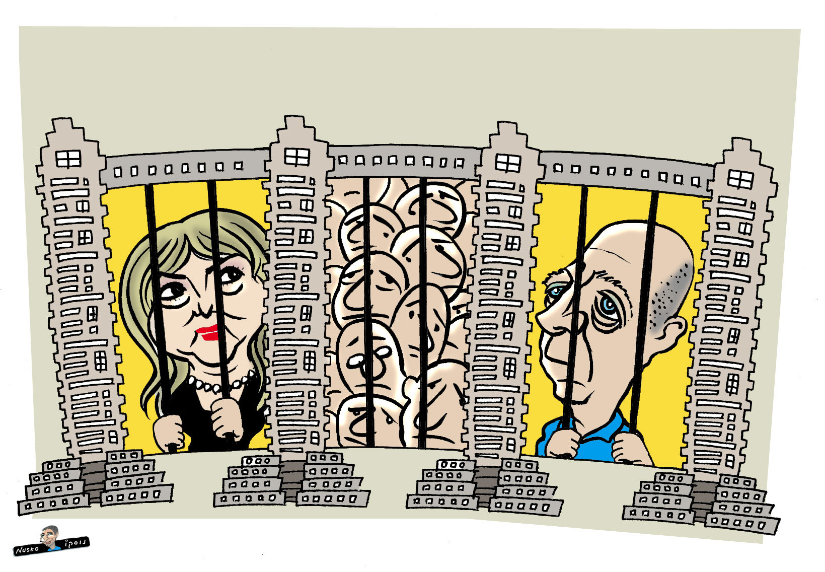 Cartoon